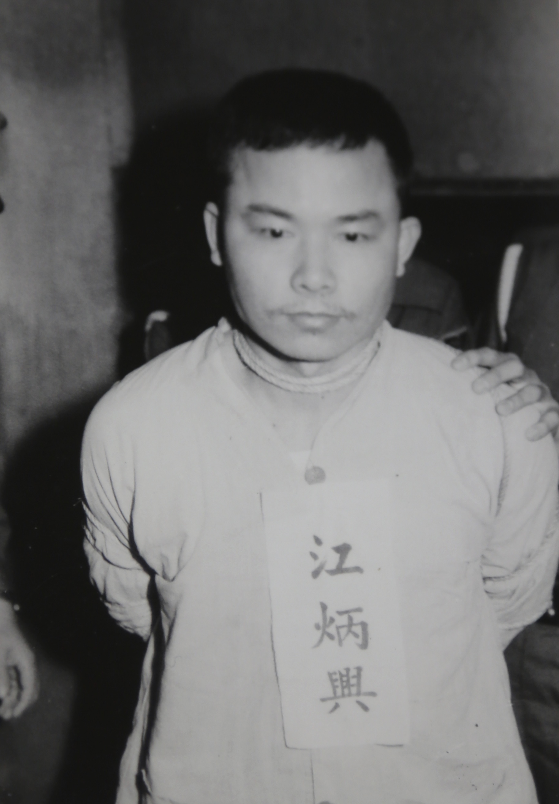 江炳興執行死刑前的照片